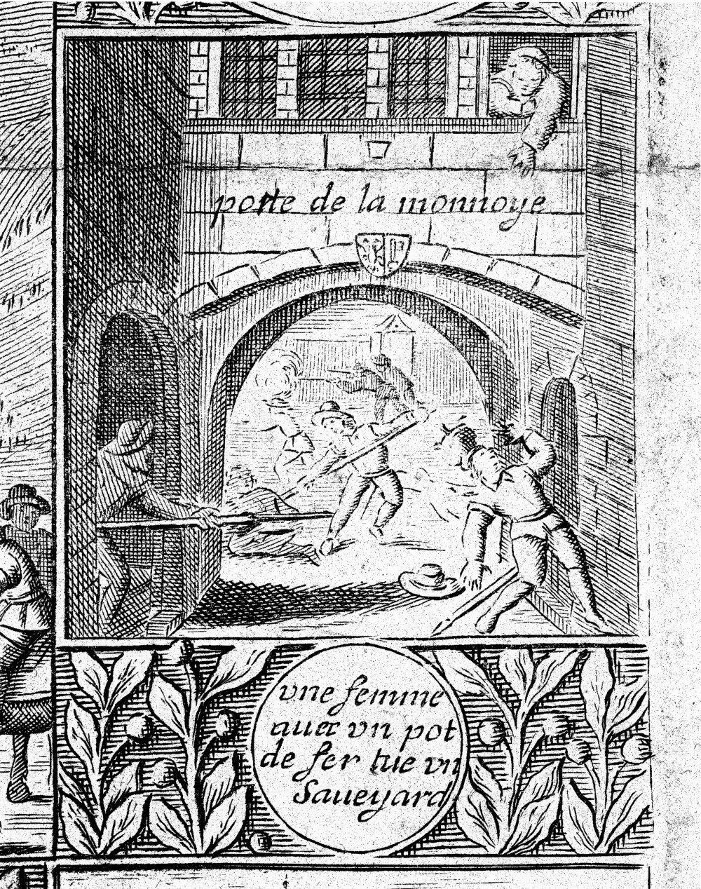 "Une femme avec un pot de fer tue un savoyard". Detail of an engraving on copper. See L'Escalade or L'Escalade for more details.